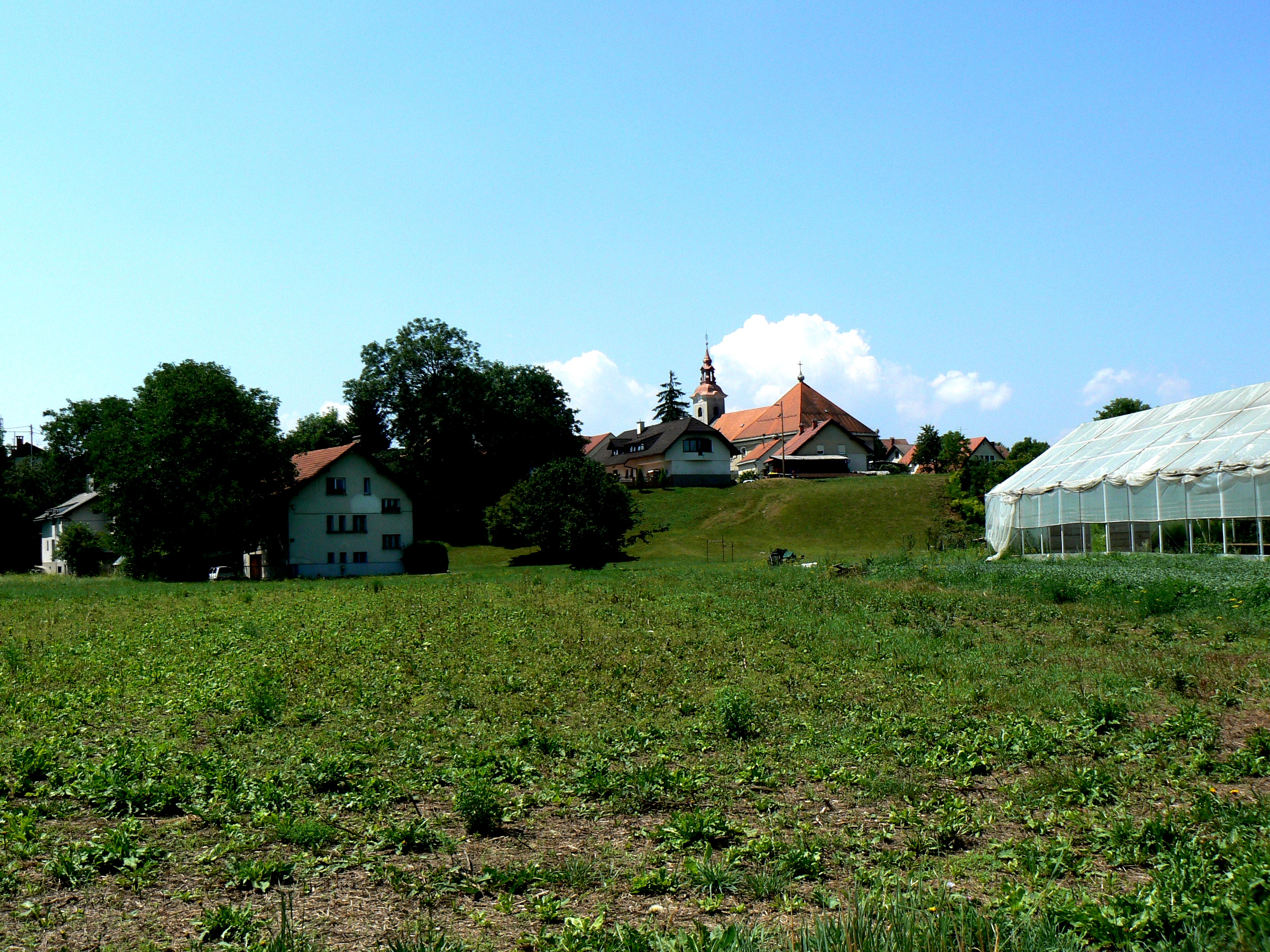 Vzpetina ali ježa po kateri je Ježica dobila ime